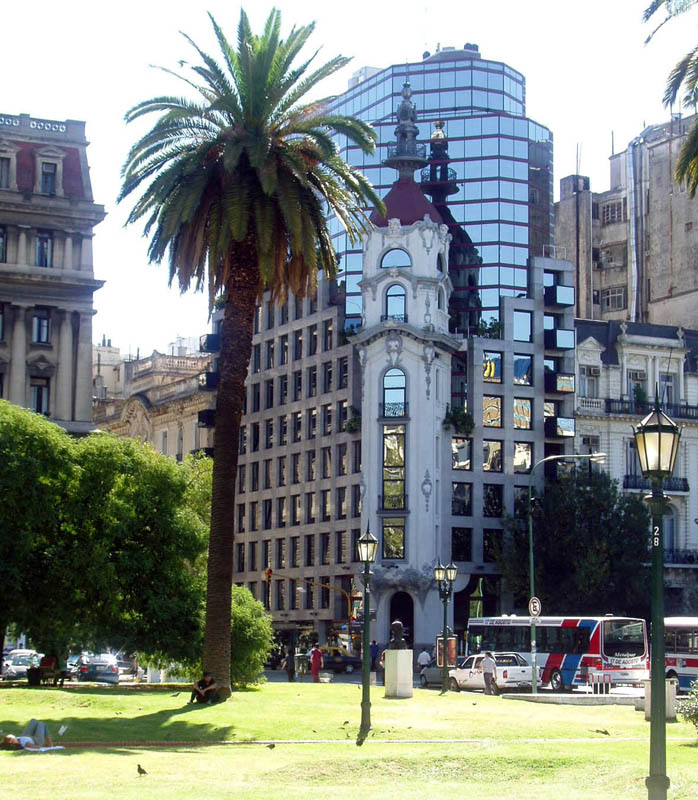 Mirador Massué. Talcahuano y Tucumán, esquina noroeste, Buenos Aires, Argentina.